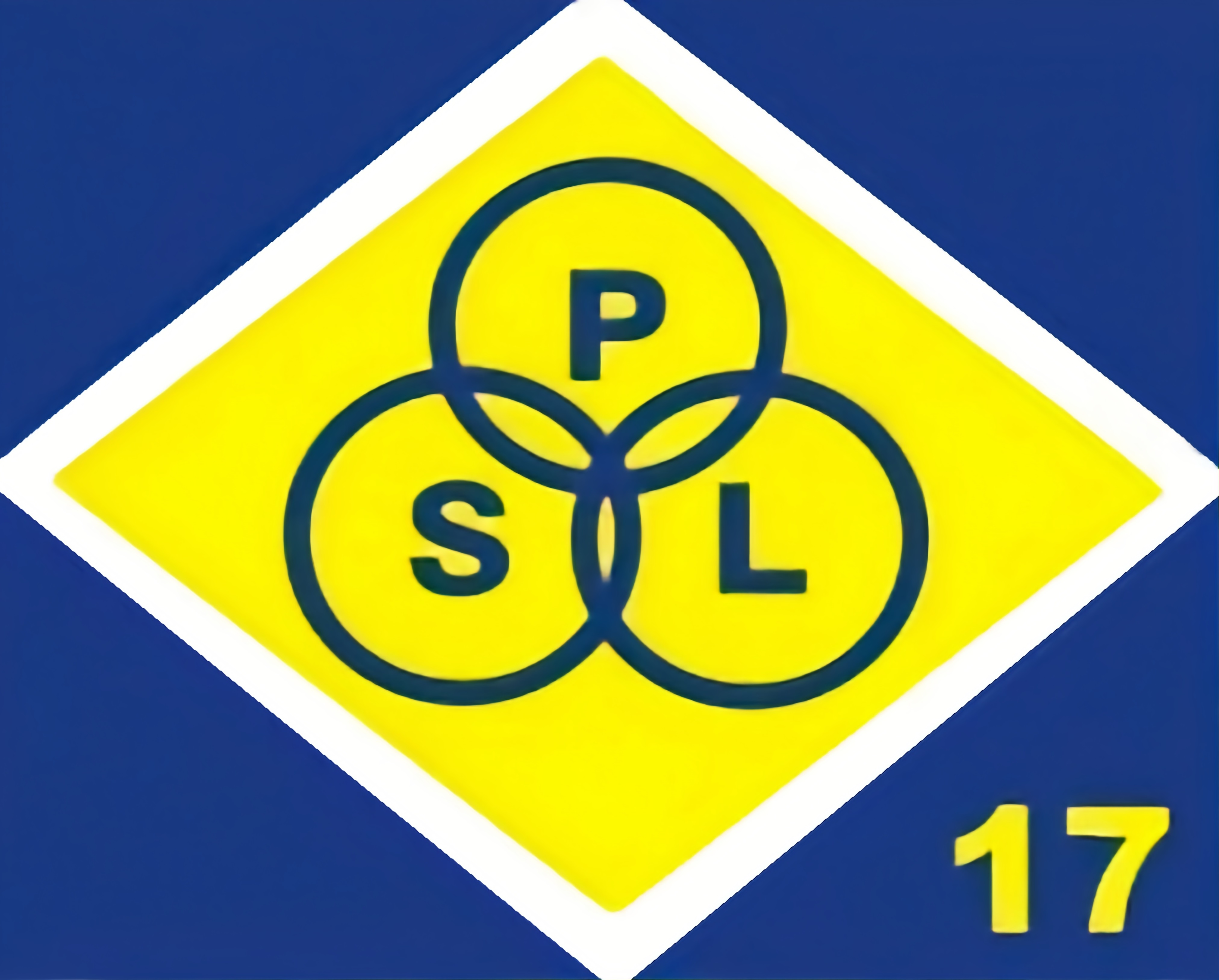 Bandeira do PSL